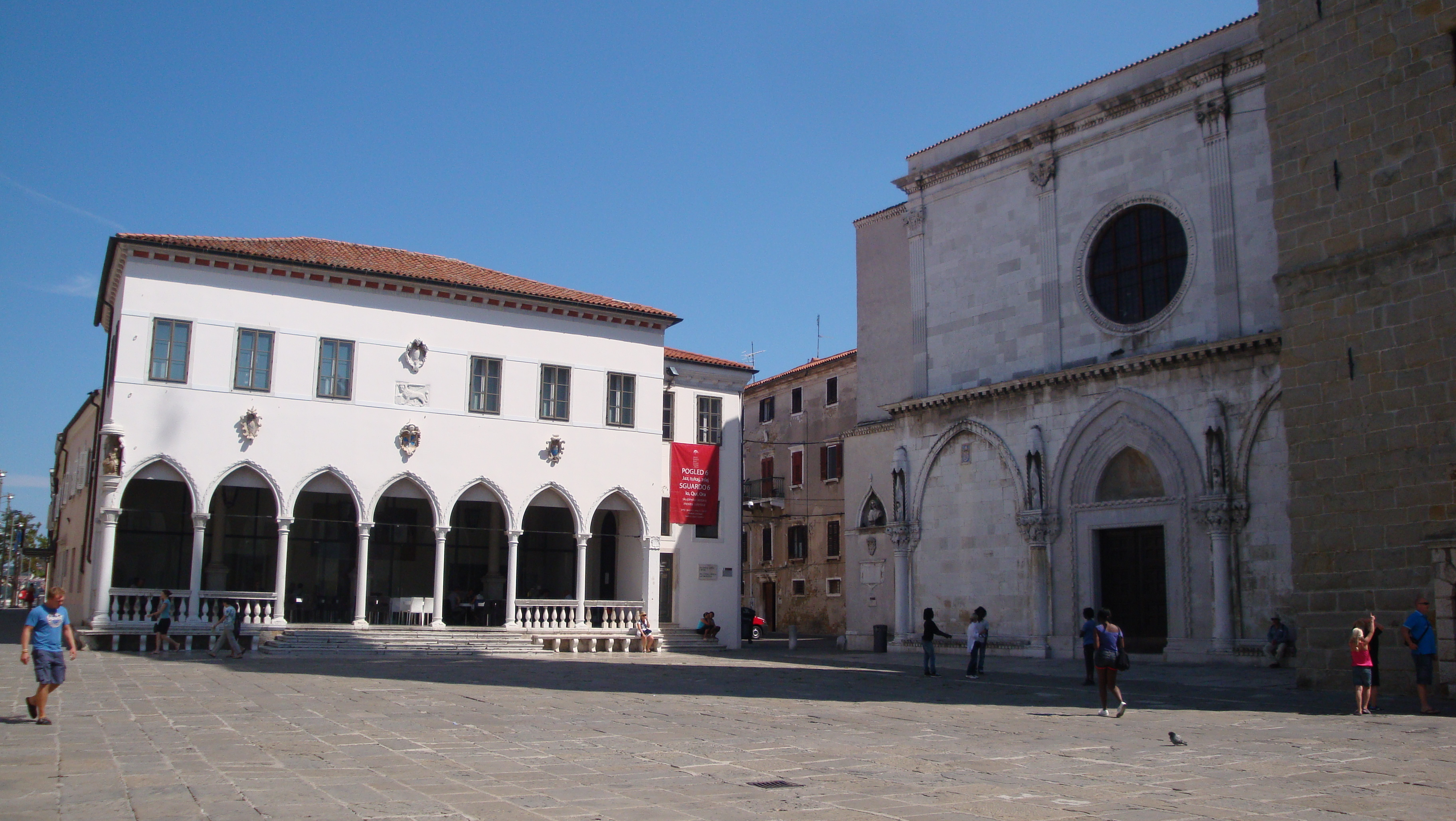 Le Palais prétorien à Koper (Slovénie)